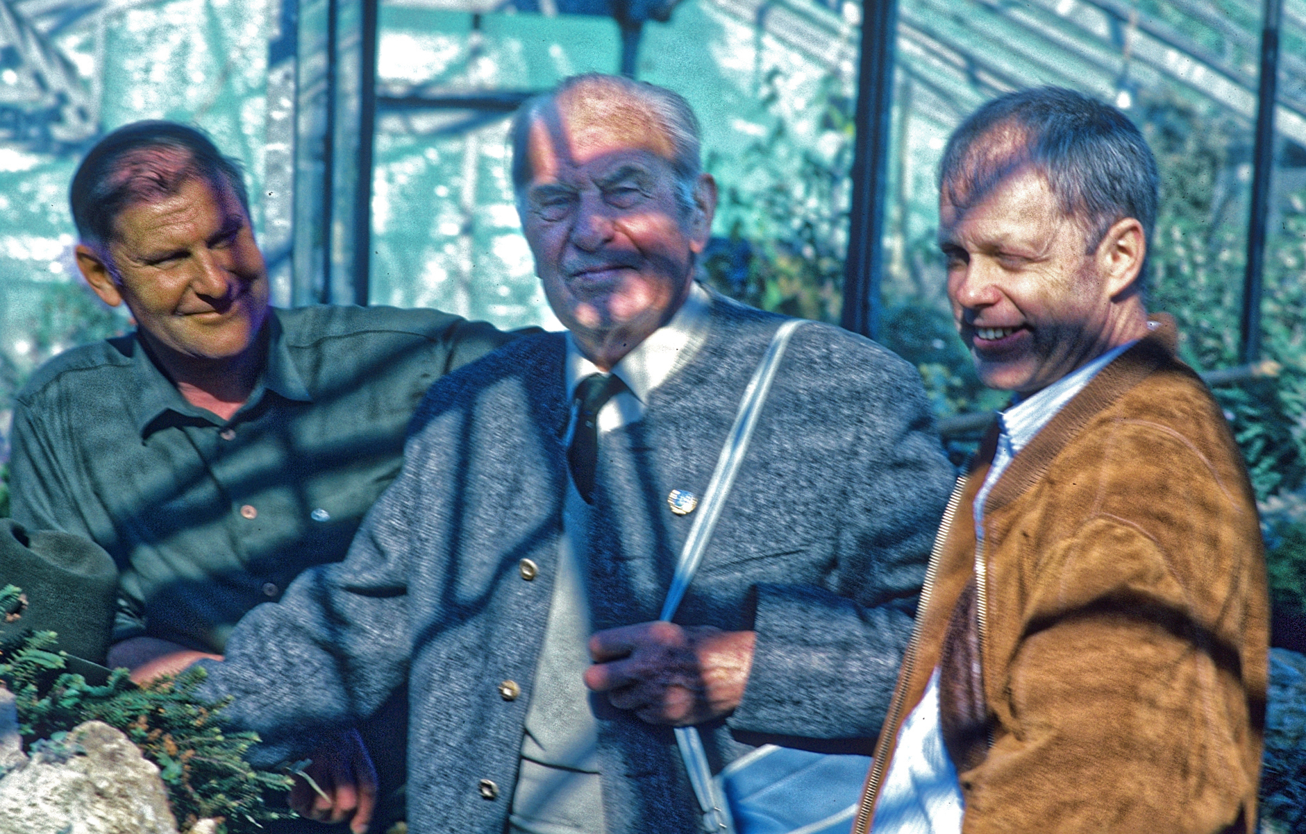 Links Dieter Schacht, Mitte Wilhelm Schacht, rechts Dr. John A. Ferguson. Wilhelm Schacht leitete 20 Jahre die Freilandanlagen im Botanischen Garten in München. Nachfolger Wilhelm Schachts in der Betreuung des Alpengartens auf dem Schachen sowie des Alpinums im Botanischen Garten München-Nymphenburg wurde sein Sohn Dieter Schacht. Die Aufnahme entstand im September 1985 anlässlich von Dreharbeiten des Bayerischen Fernsehens über das Alpinpflanzengewächshaus.